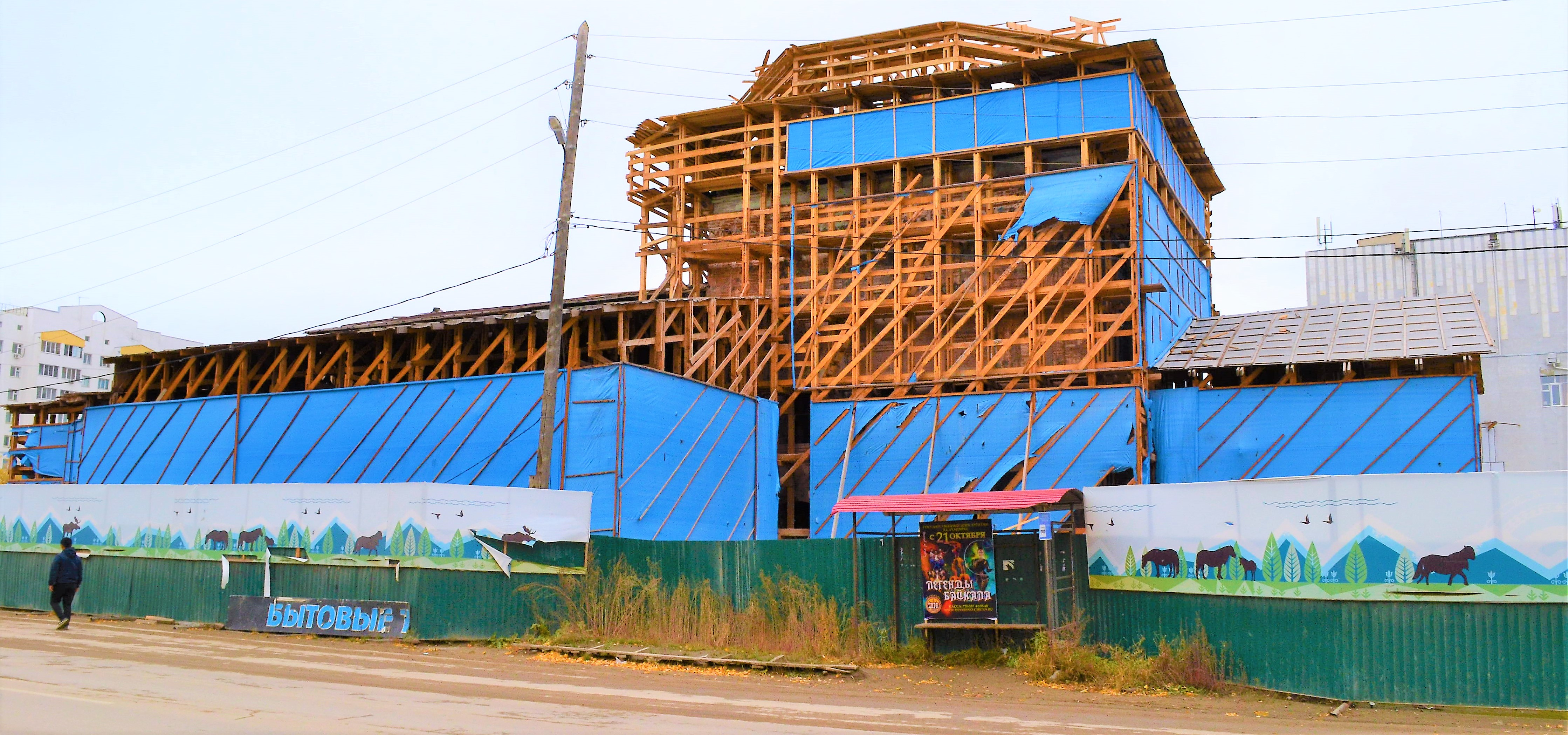 Троицкий кафедральный собор: улица Каландарашвили, 2, Якутск, Якутия (Саха)